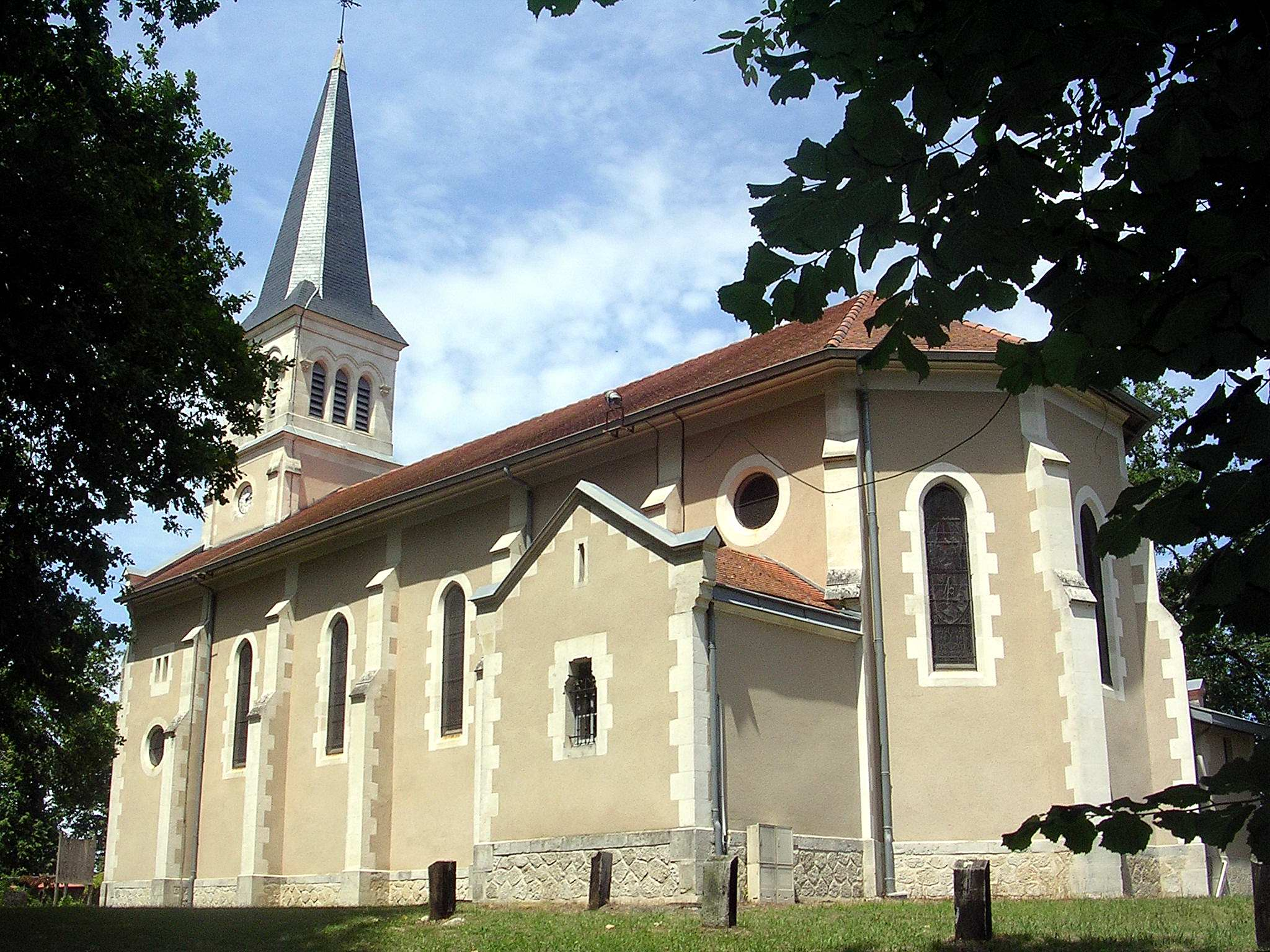 Église Saint-Michel de Bias, dans le département français des Landes